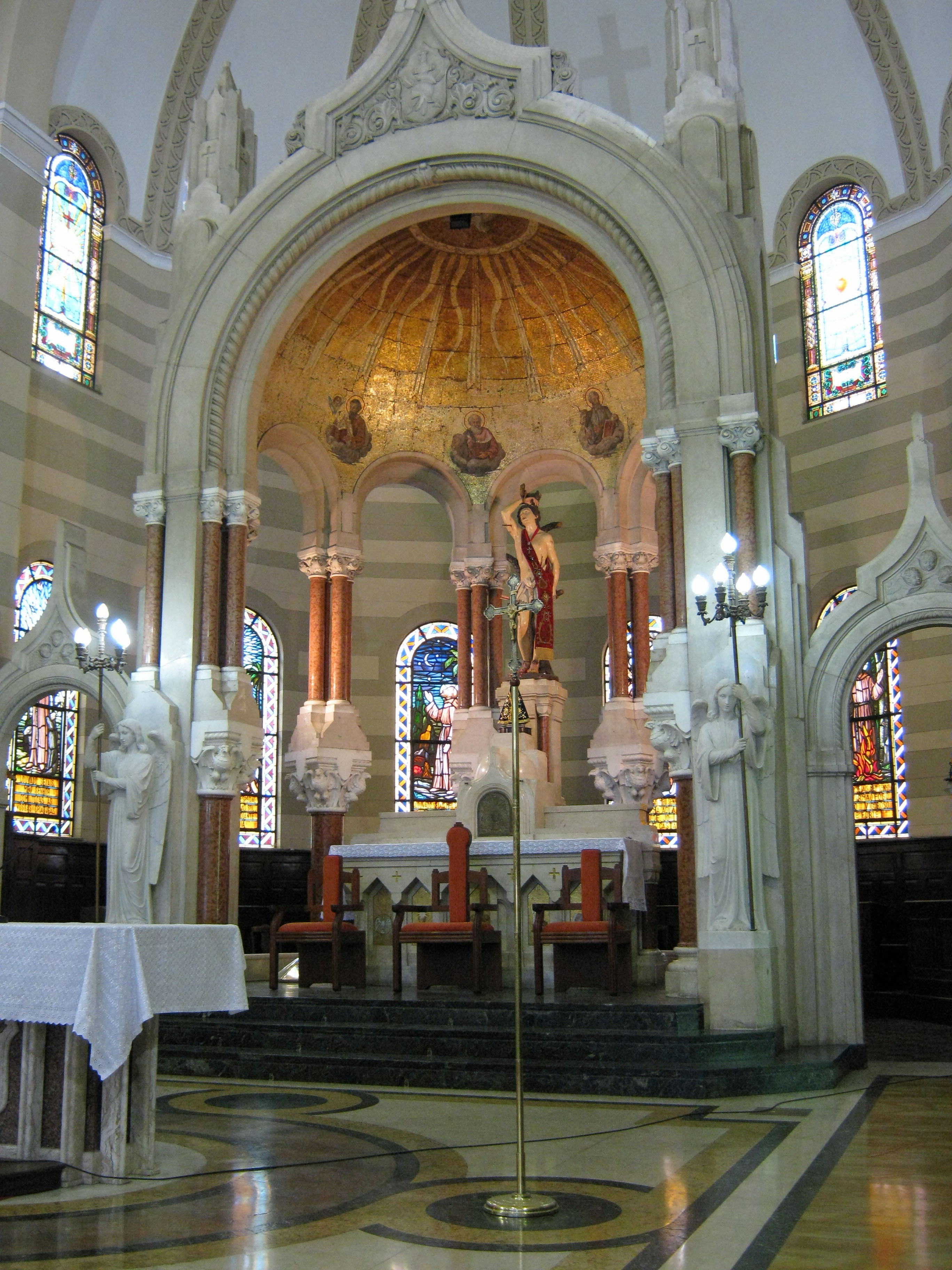 Paróquia de São Sebastião - Frades Capuchinhos - Altar mor